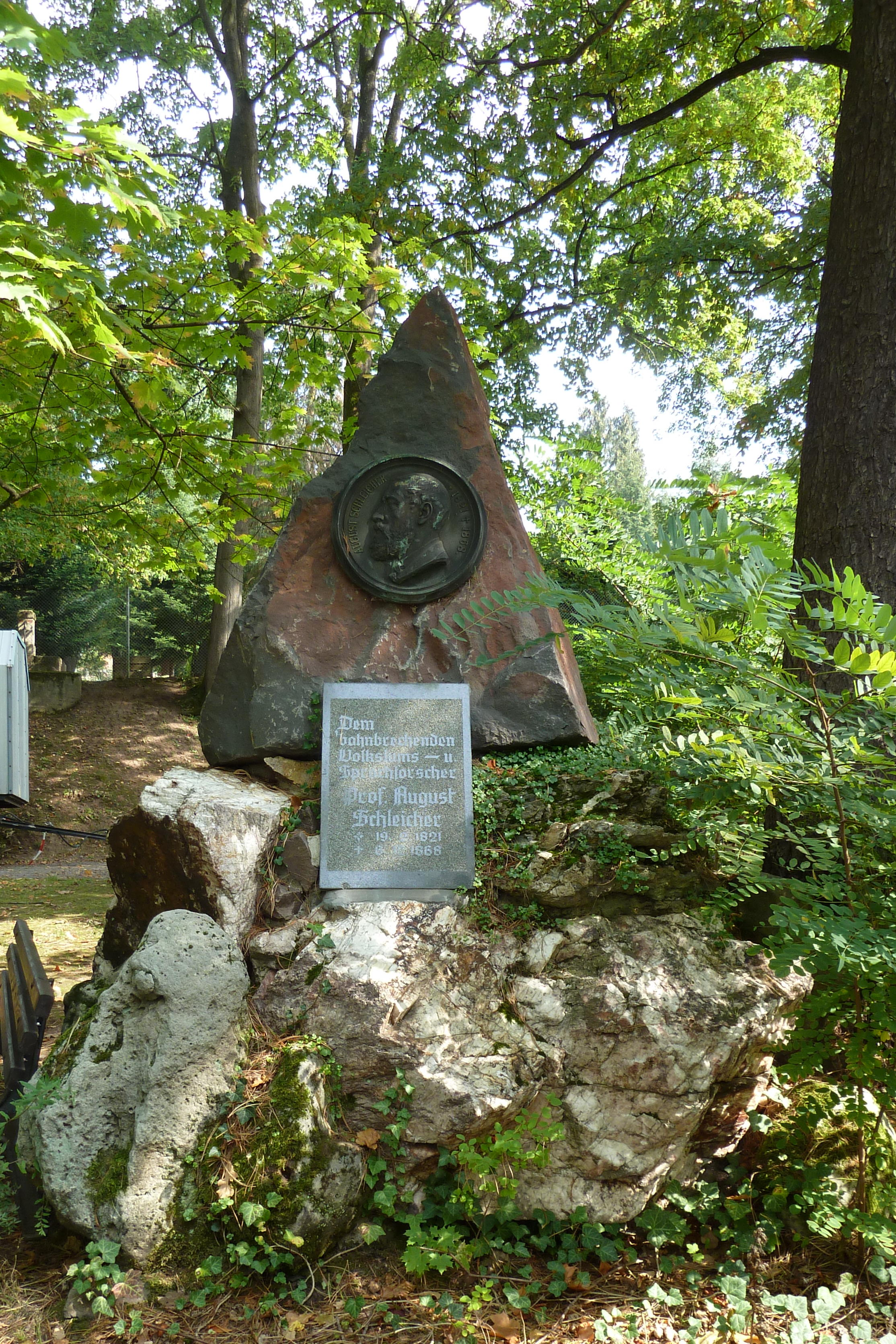 Schleicher-Denkmal, 1894, Reinhard Möller, Sonneberg, Kirchstraße